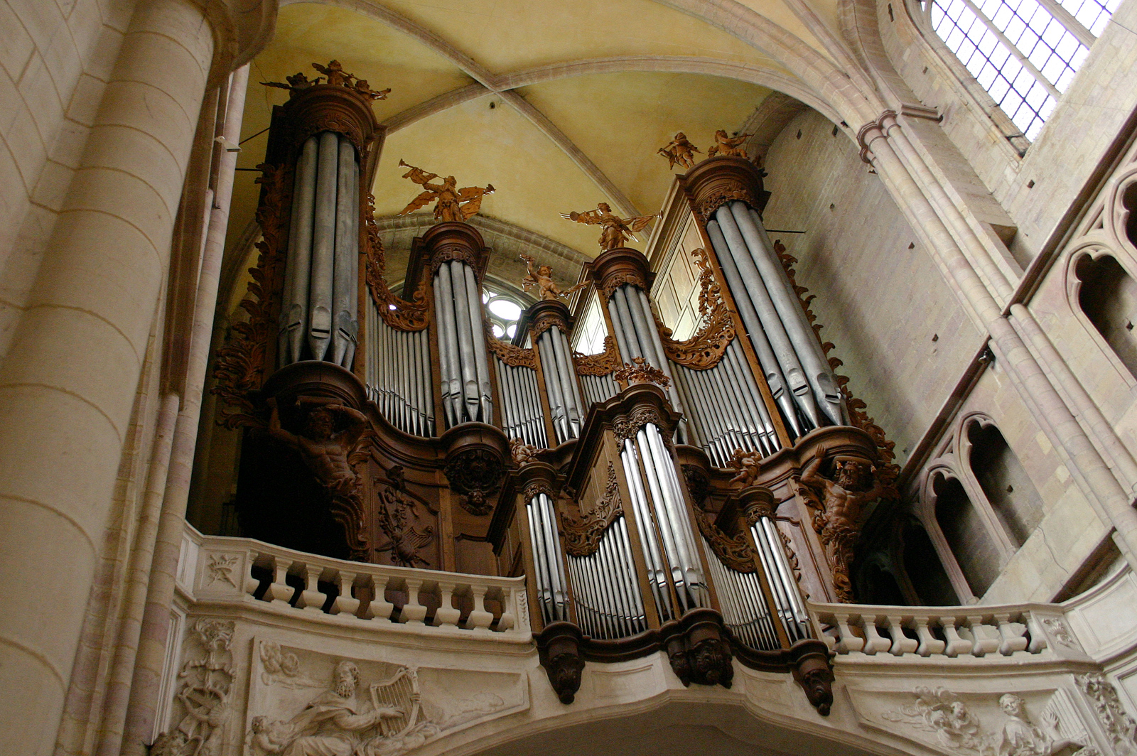 Orgel der Kathedrale Saint Bénigne, Dijon. Buffet du sculpteur Edme MARLET pour l'orgue des frères Charles-Joseph et Robert Riepp en 1743 dont c'est l'instrument le plus grand et le plus abouti; restauré en 1847 par Daublaine et Callinet et rétabli dans son état originel en 1996 par Gerhard Schmid de Kaufbeuren qui a toutefois regroupé les jeux hérités du XIXe siècle dans un Récit expressif. Buffet classé Monument Historique au titre objet depuis le 05-12-1908.